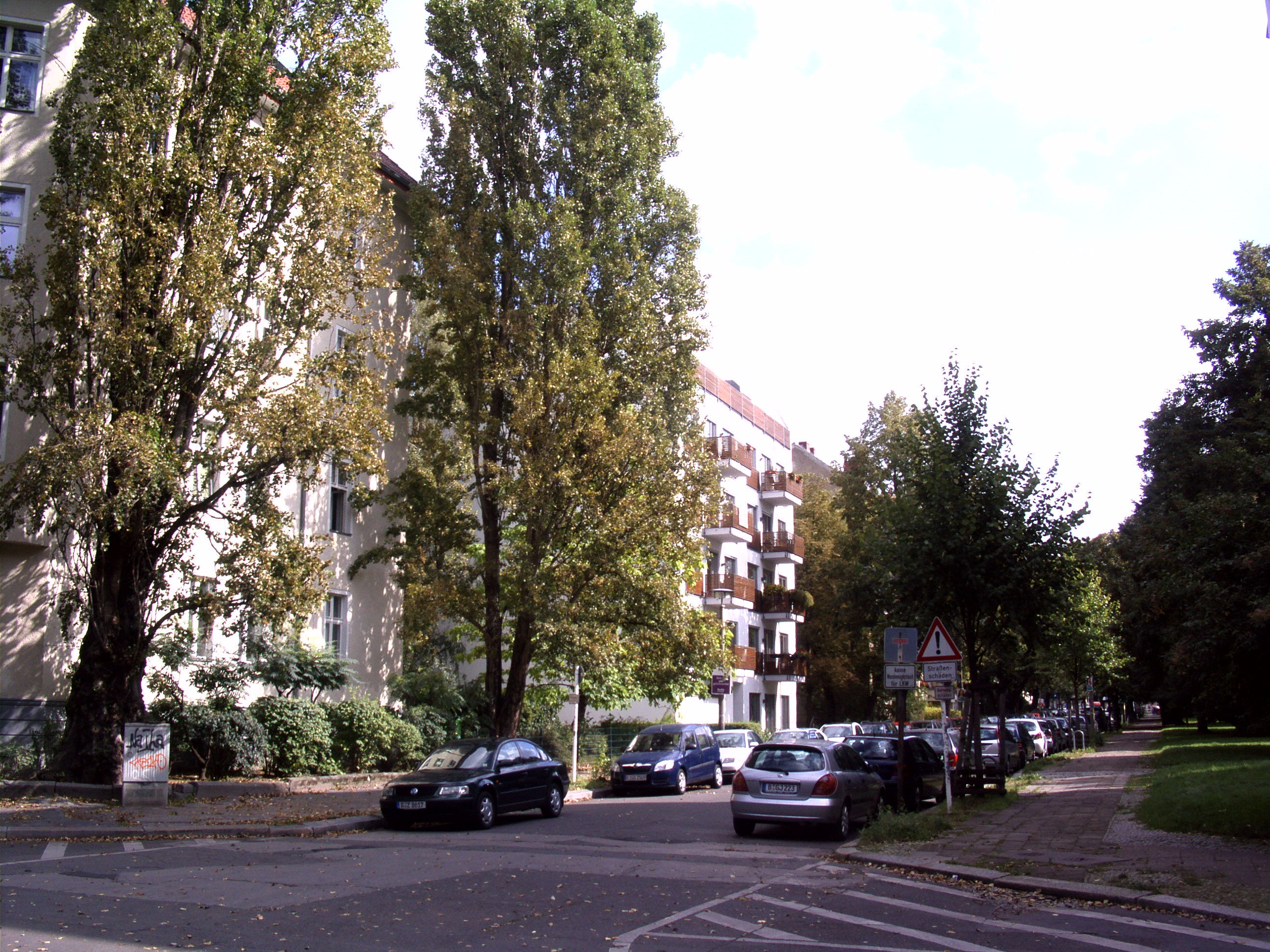 Brennerstraße vom Hoferplatz Ri. Berliner Straße